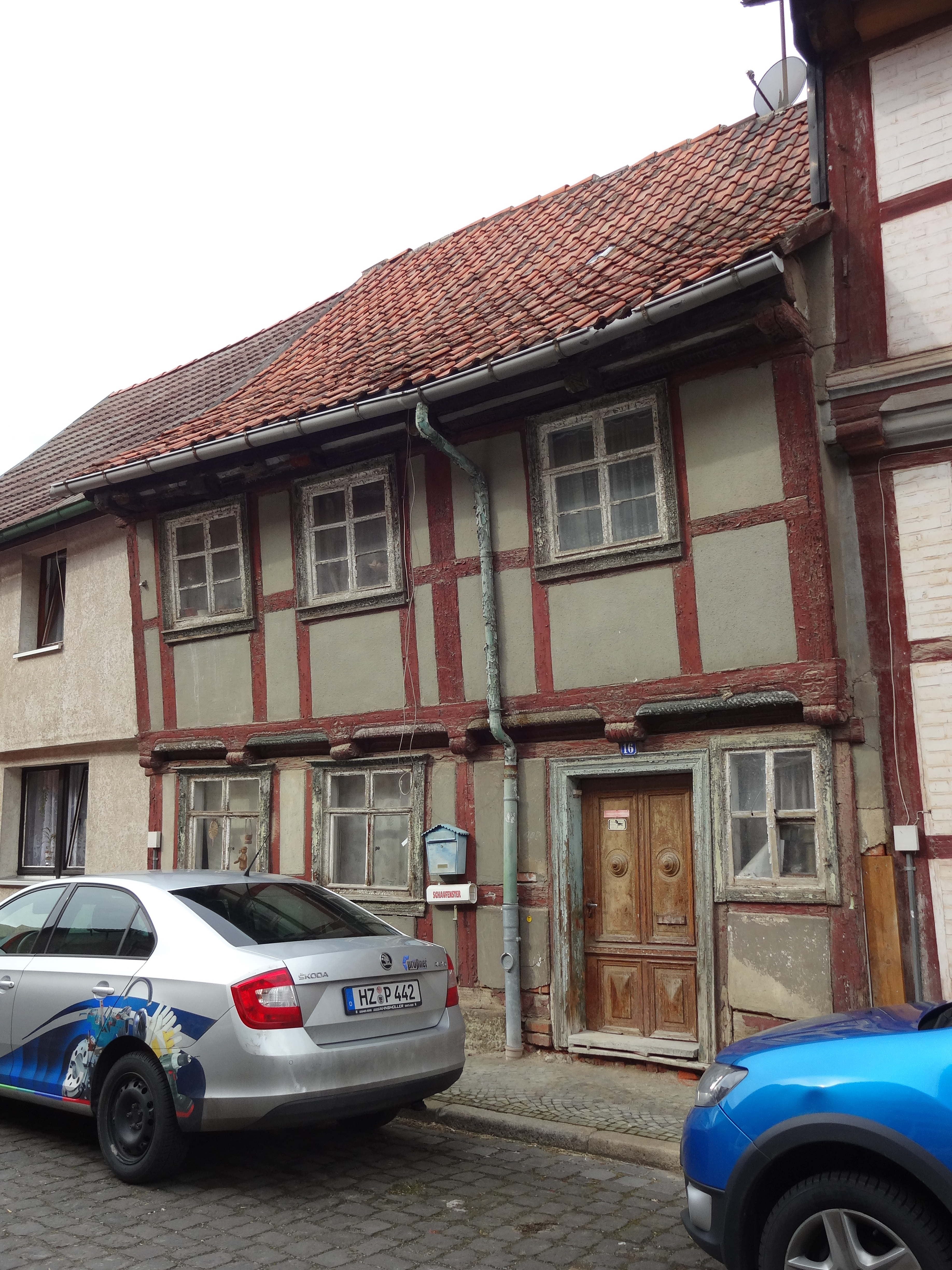 denkmalgeschütztes Fachwerkhaus in der Mittelstraße 16 in Derenburg, Ortsteil von Blankenburg (Harz)